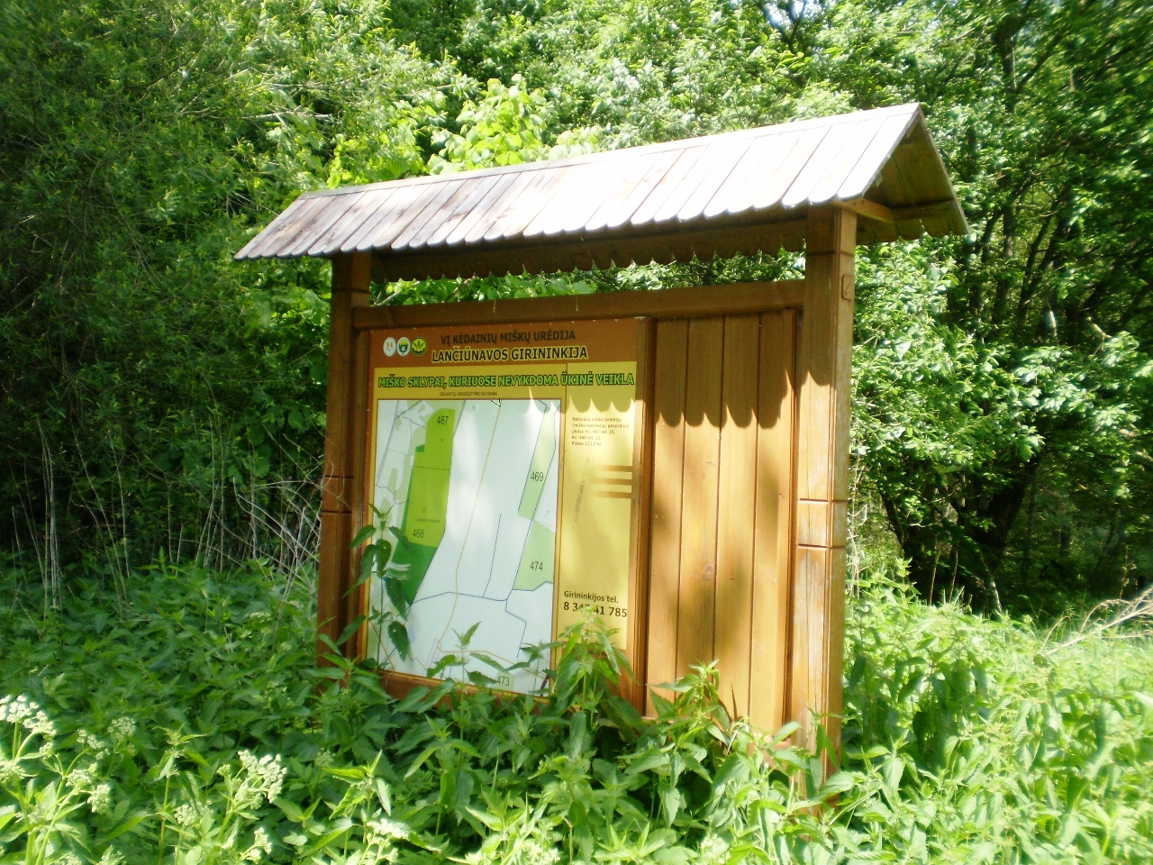 Stendas netoli Laukagalio pelkės, Kėdainių raj.